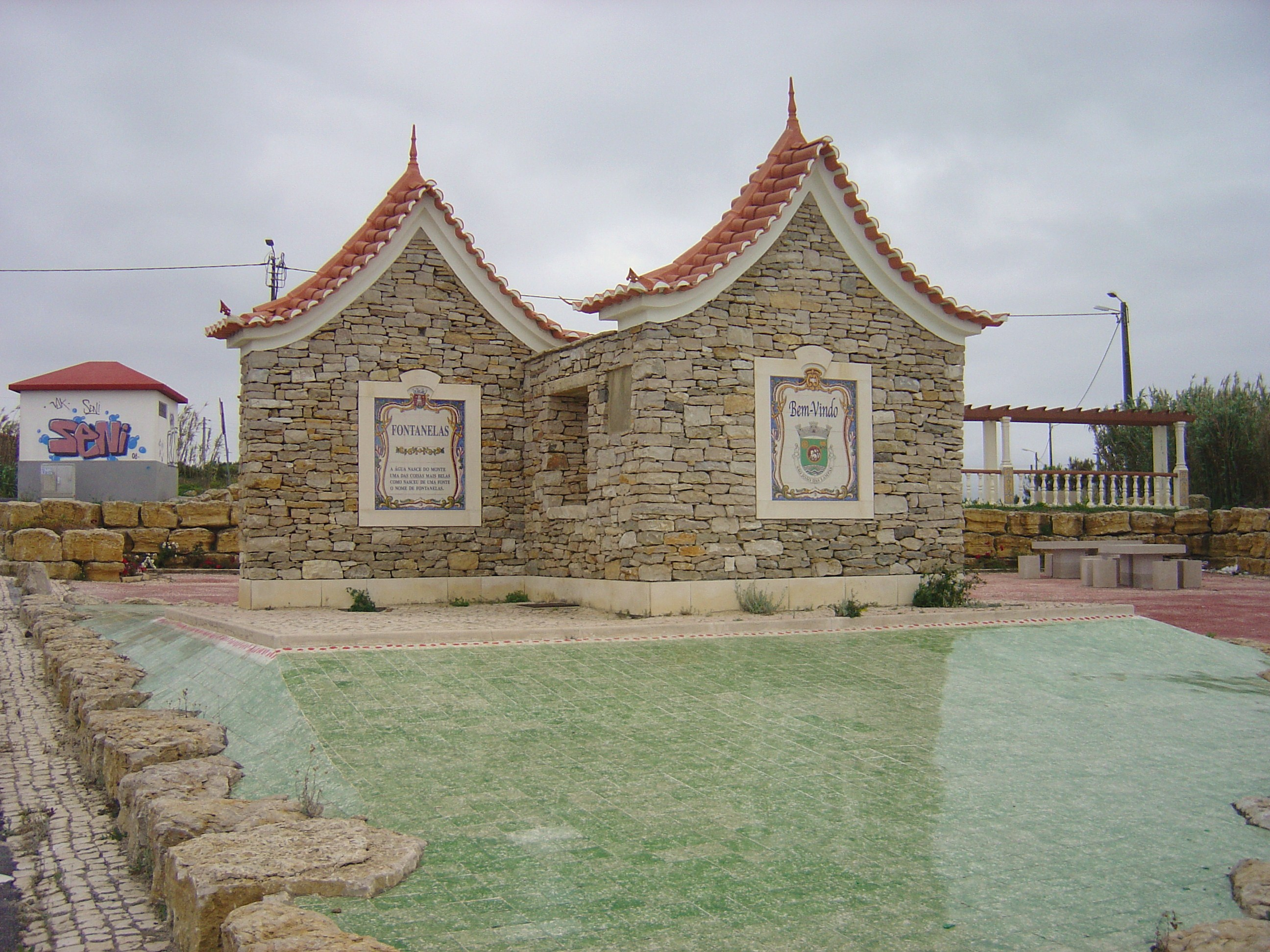 Fontanelas, Portugal